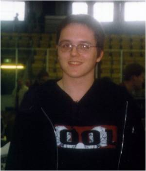 Sipke Ernst